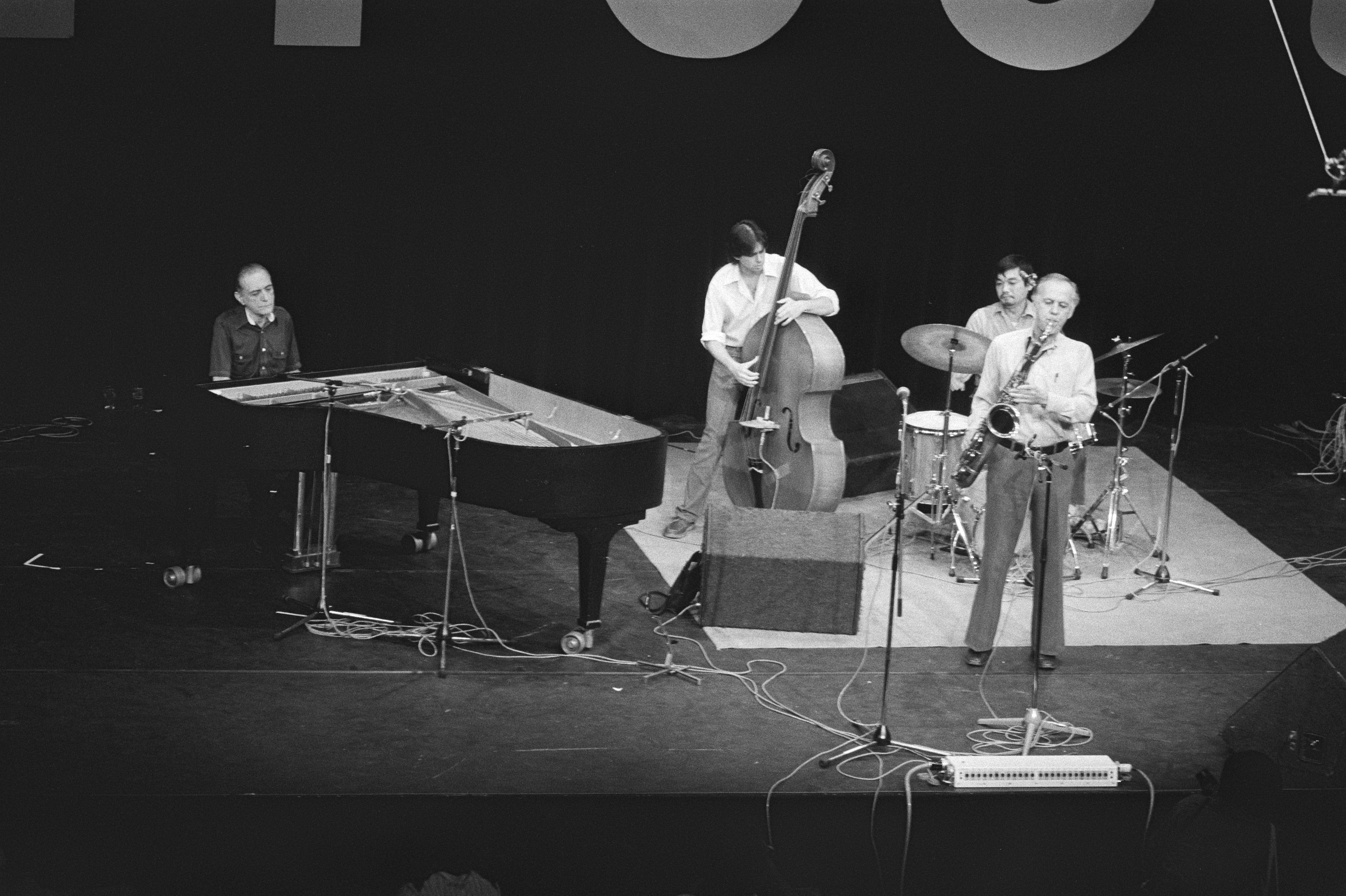 Internationale Jazz Festival in de Meervaart te Amsterdam 12/13/14 augustus Warne Marsh Quartet. v.l.n.r: Sal Mosca, piano; Frank Canino, bas; Taro Akomoto, drums en Warne Marsh, tenor saxofoon. 12 augustus 1982